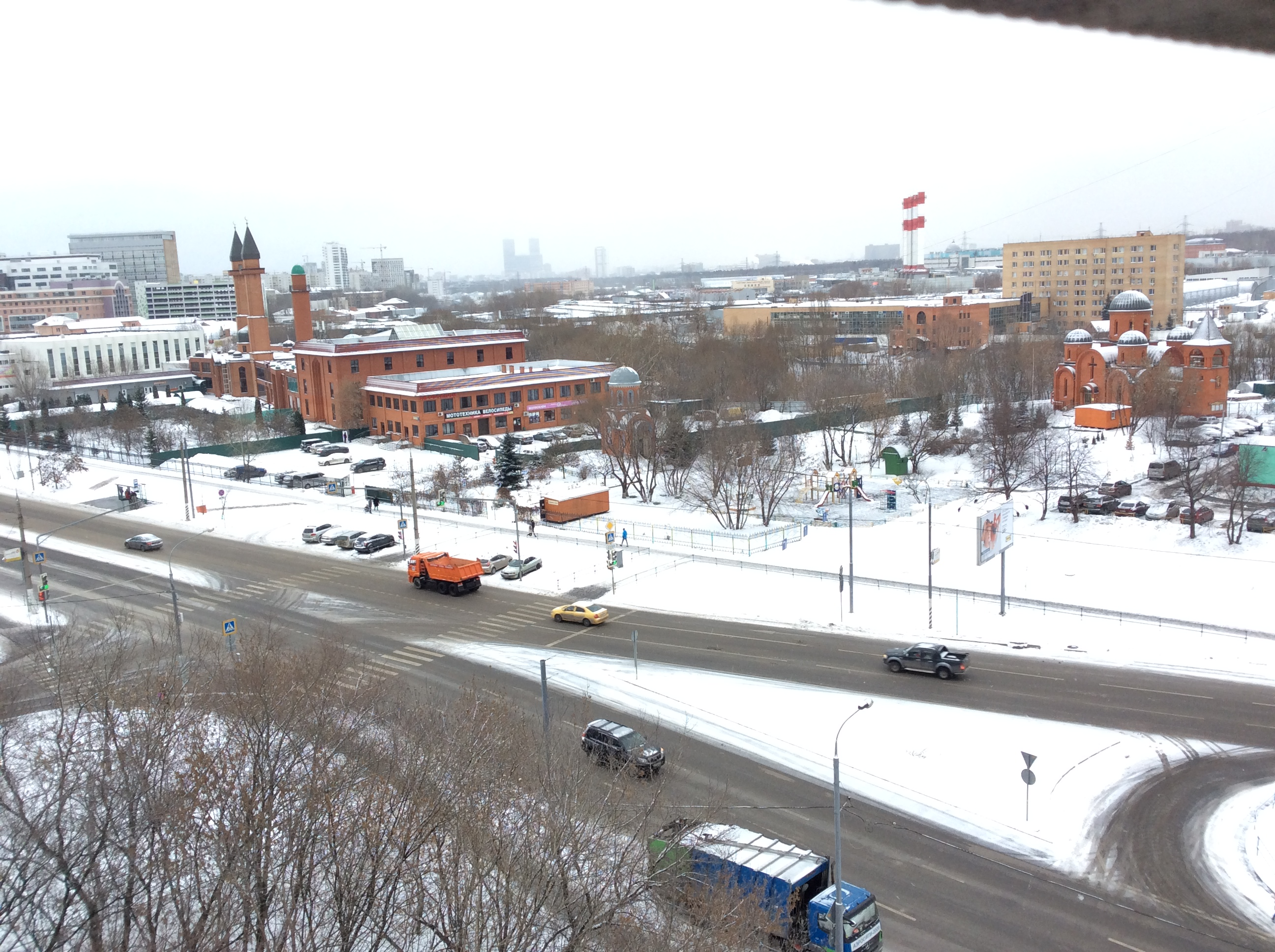 На фотографии одновременно видны две мусульманские мечети с минаретами, православная часовня, православный храм и синагога. Фотография сделана со здания подстанции МГТС.